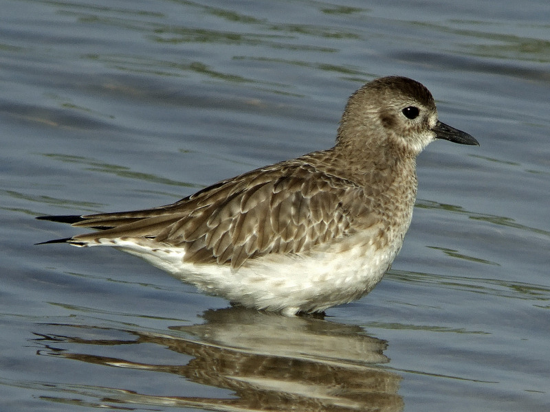 Pluvialis squatarola, delta sine saloum (SE).